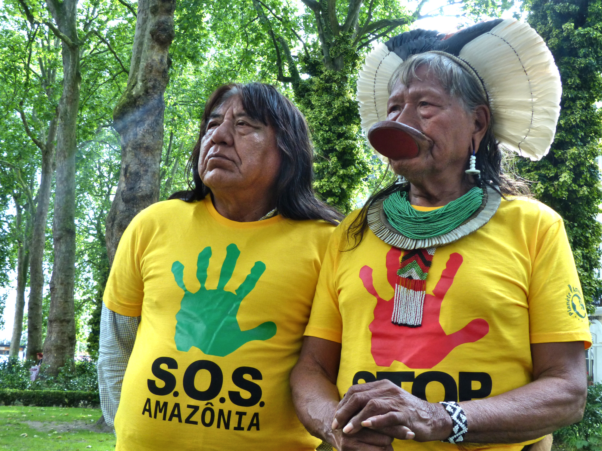 Le cacique Raoni Metuktire et son neveu Megaron Txucarramãe le 9 juin 2014 à Londres pendant le S.O.S. Amazônia Tour organisé par Planète Amazone au moment de la Coupe du monde de football.